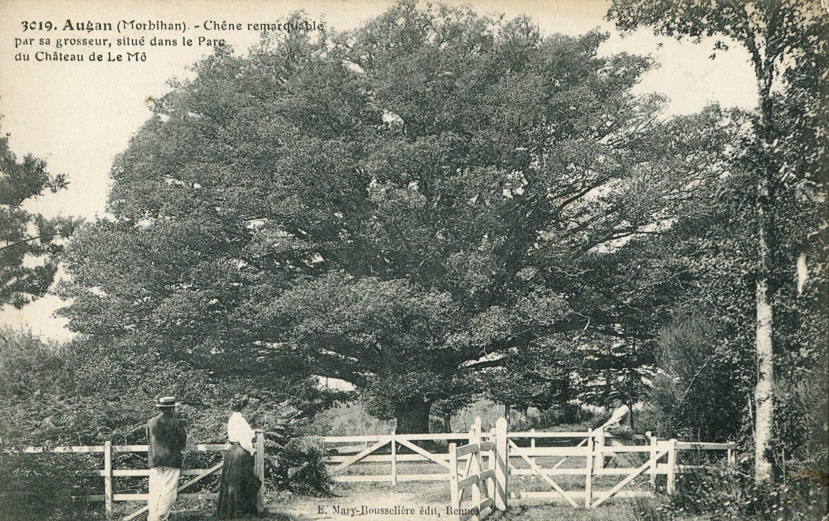 Cette carte postale d'une série libre de droit a été mainte fois utilisée en tant qu'illustration.